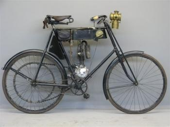 Herdtle-Bruneau 1 hp motorcycle from 1903.